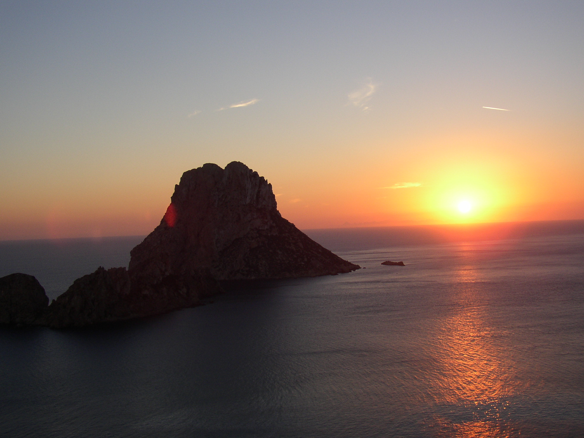 Die Insel Es Vedrà vor der Insel Ibiza